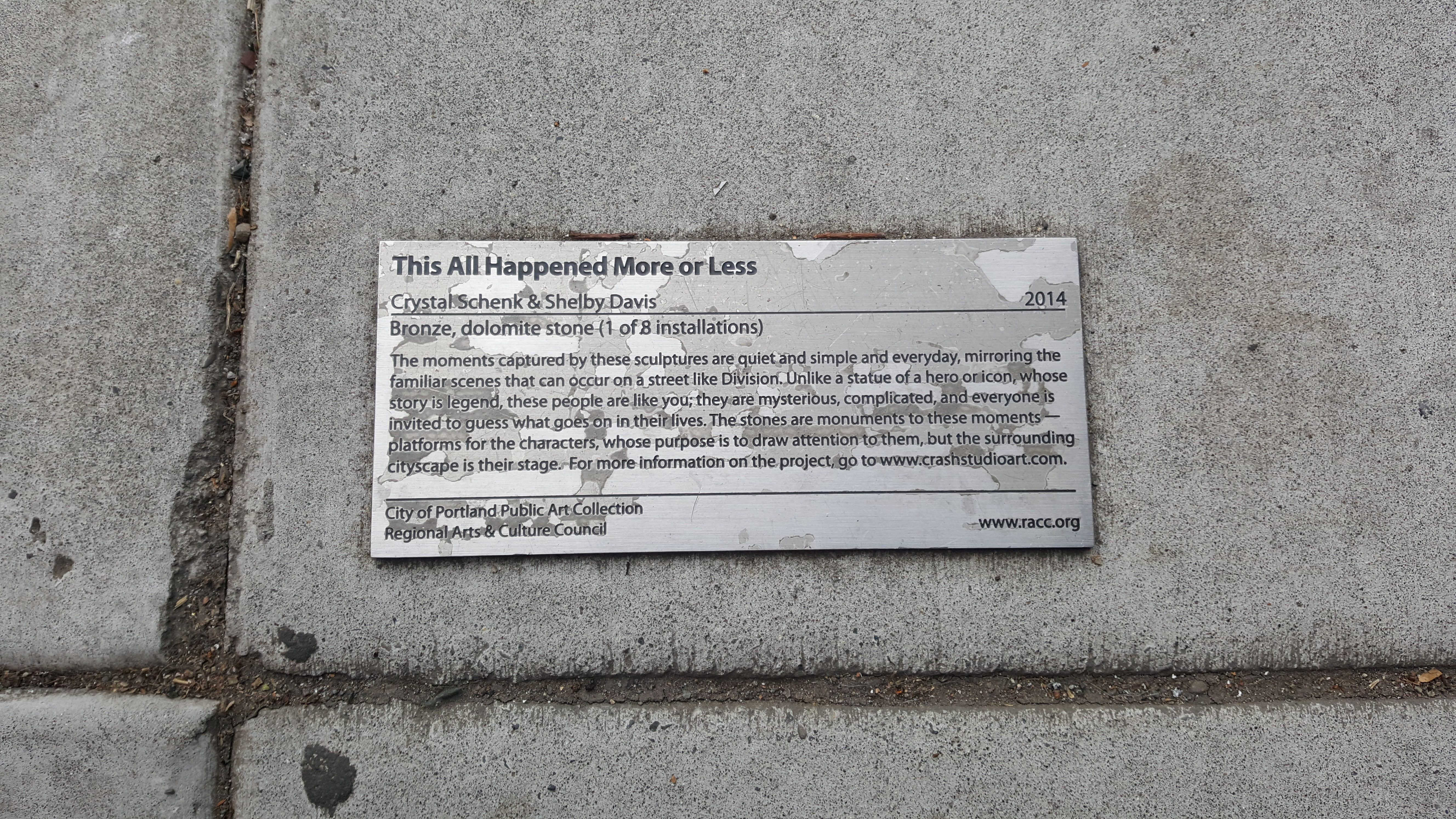 Plaque on SE Division